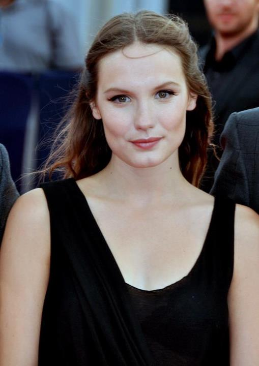 Ana Girardot au festival du film américain de Deauville